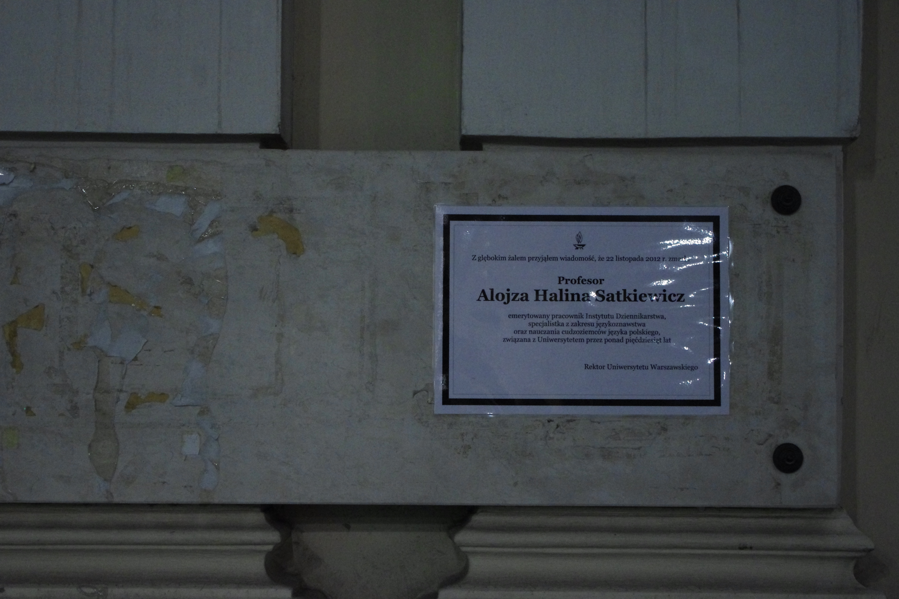 Nekrolog prof. Alojzy Haliny Satkiewicz – językoznawcy, specjalistki w zakresie nauczania cudzoziemców języka polskiego, autorki podręczników, pracownika Uniwersytetu Warszawskiego, wywieszony na bramie wjazdowej do UW.